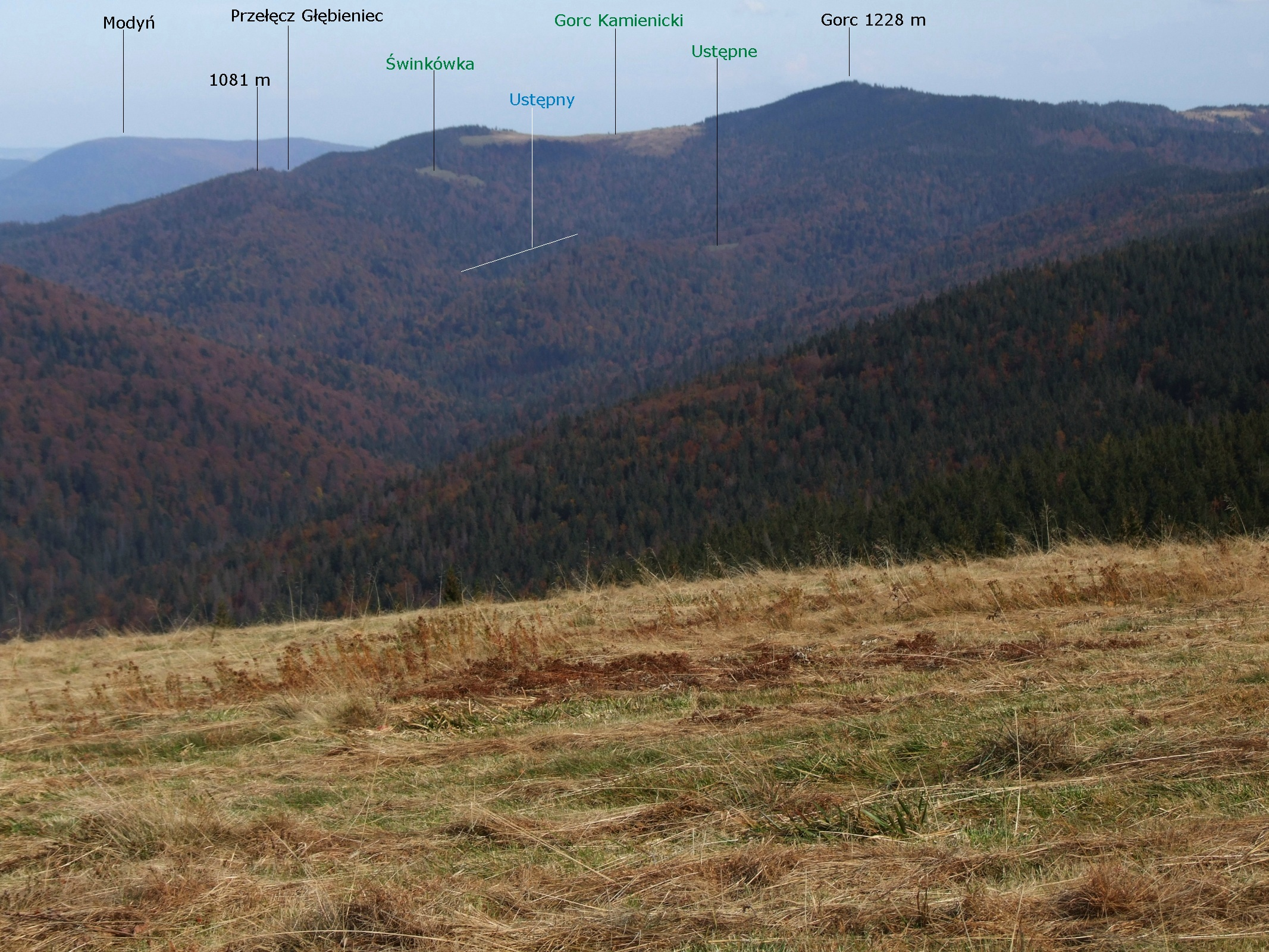 Widok z polany Jaworzyna Kamienicka na dolinę Kamienickiego Potoku i Gorc